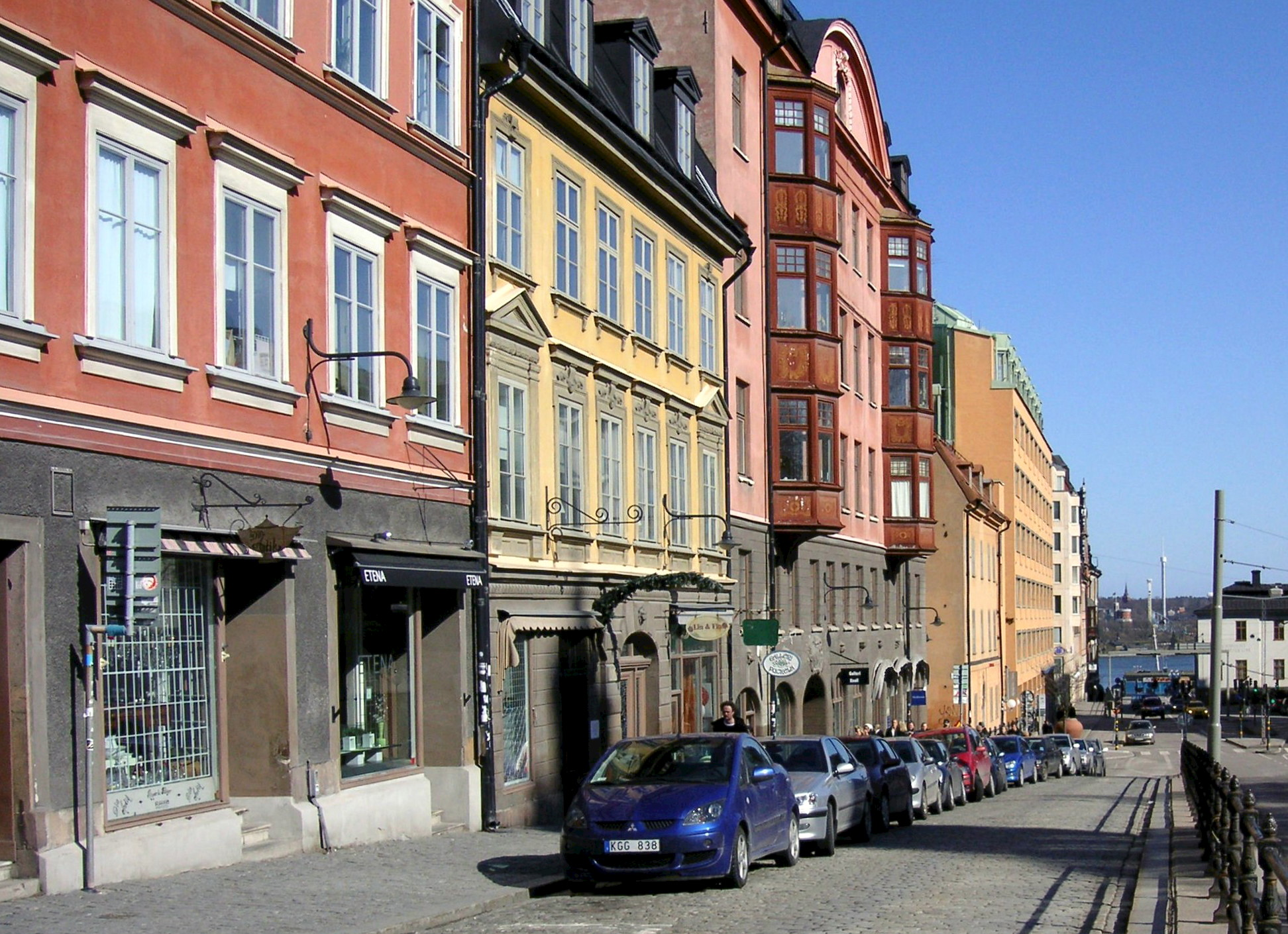 Hornsgatspuckeln vid Hornsgatan 26-30 på Södermalm i Stockholm (kvarteret Stenbocken)